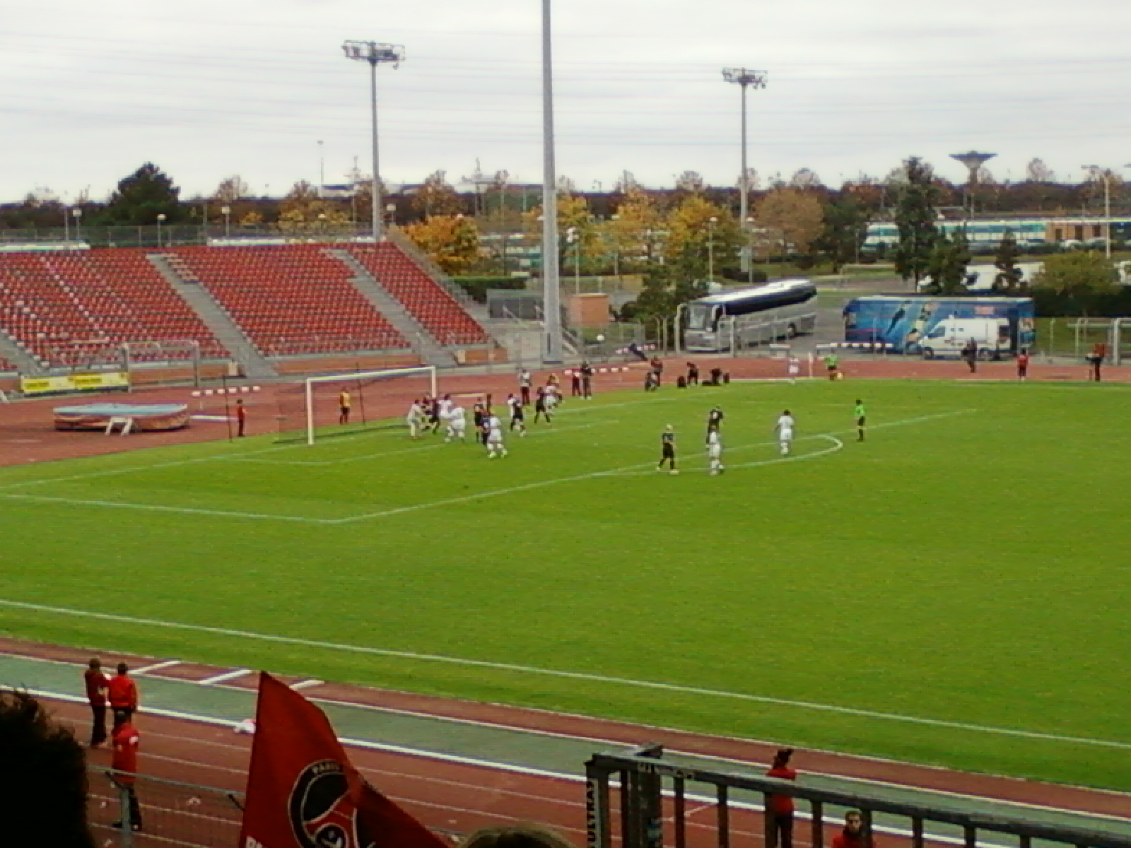 Match PSG - Lyon féminines du 30 octobre 2011 au stade Dominique-Duvauchelle